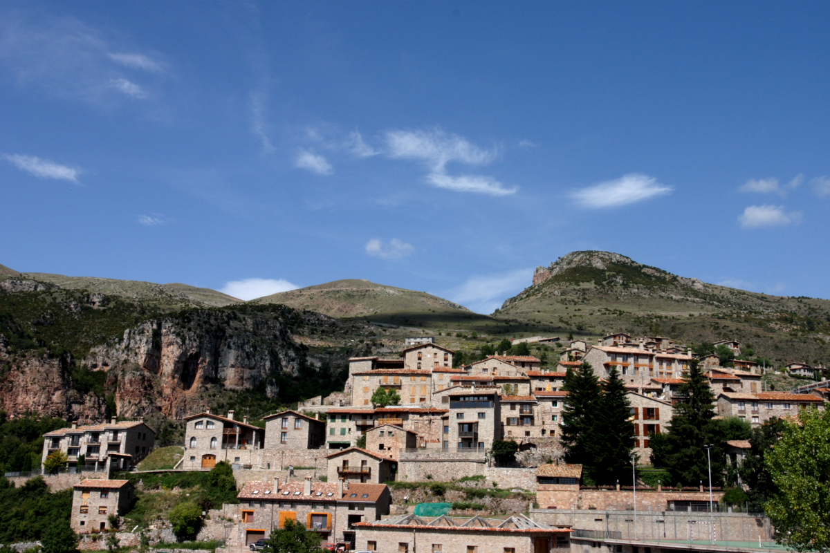 Vista de Castellar de n'Hug (Berguedà-Catalunya).